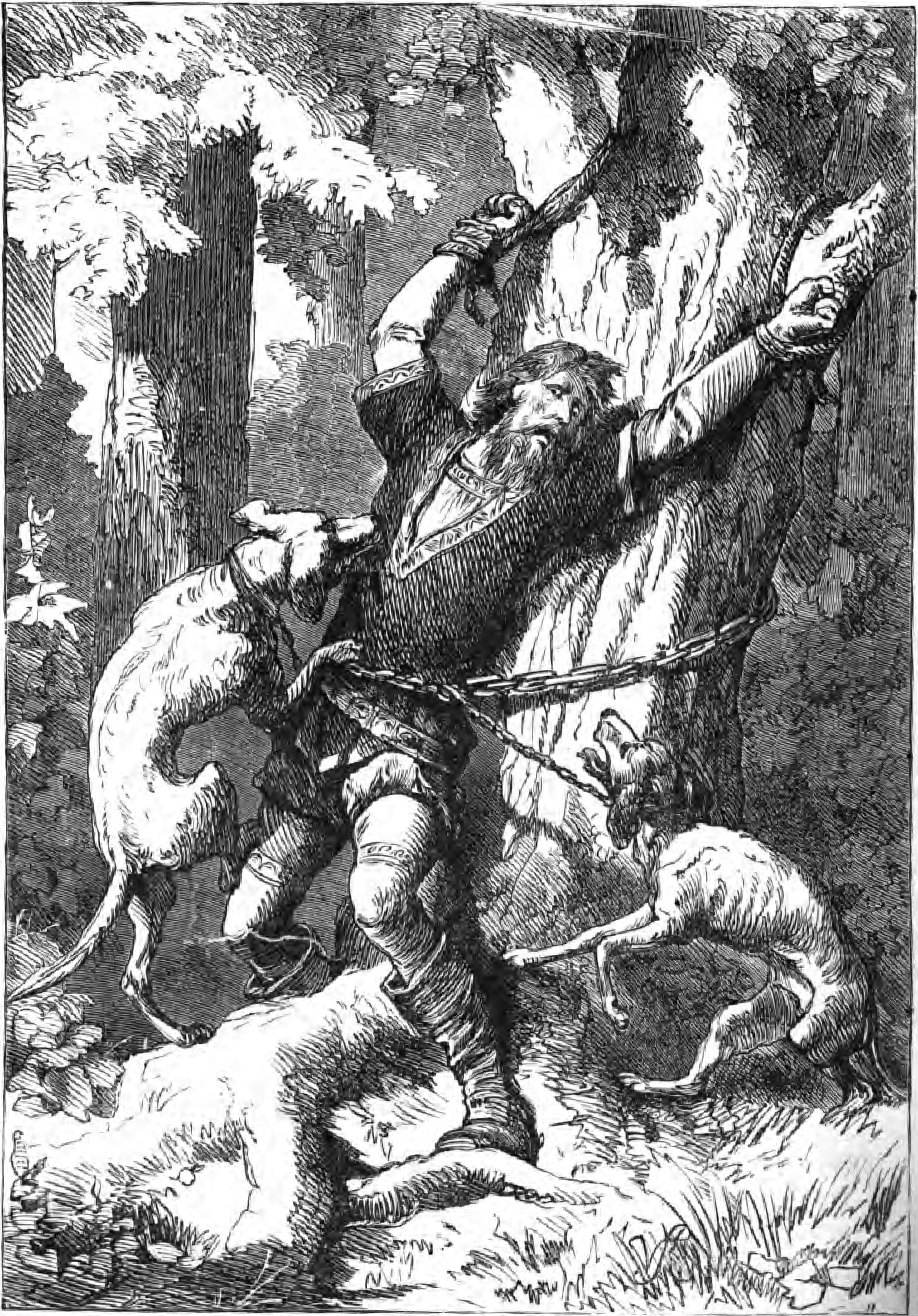 Bildunterschrift: Ende des Besitzers vom Hungerkeller